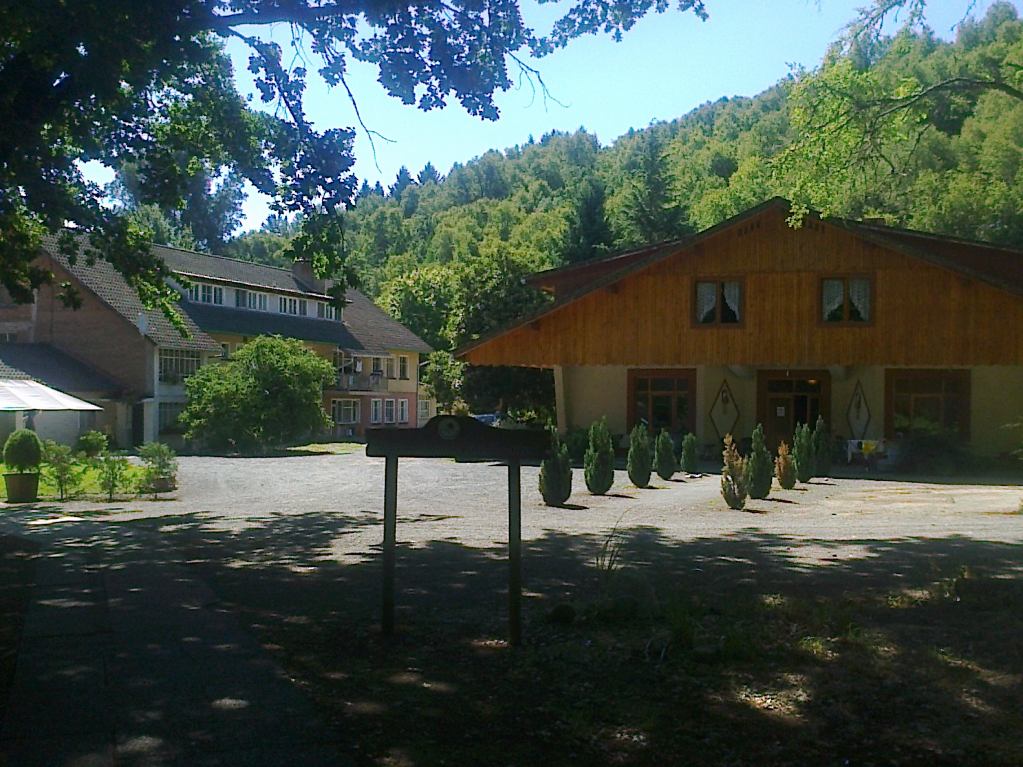 Casas en lo que es hoy el Hotel Villa Baviera